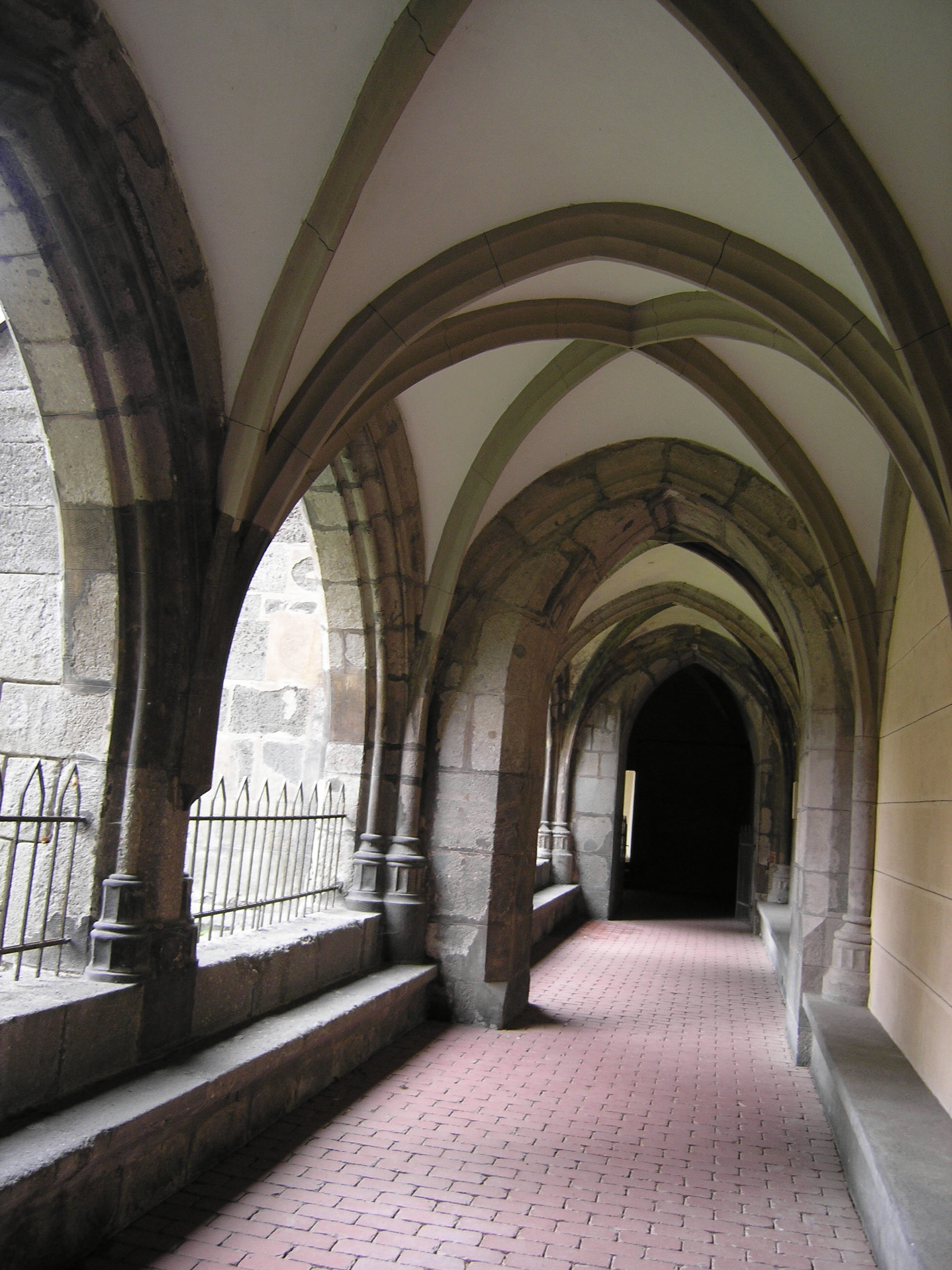 Chodba kláštera v Hronském Beňadiku